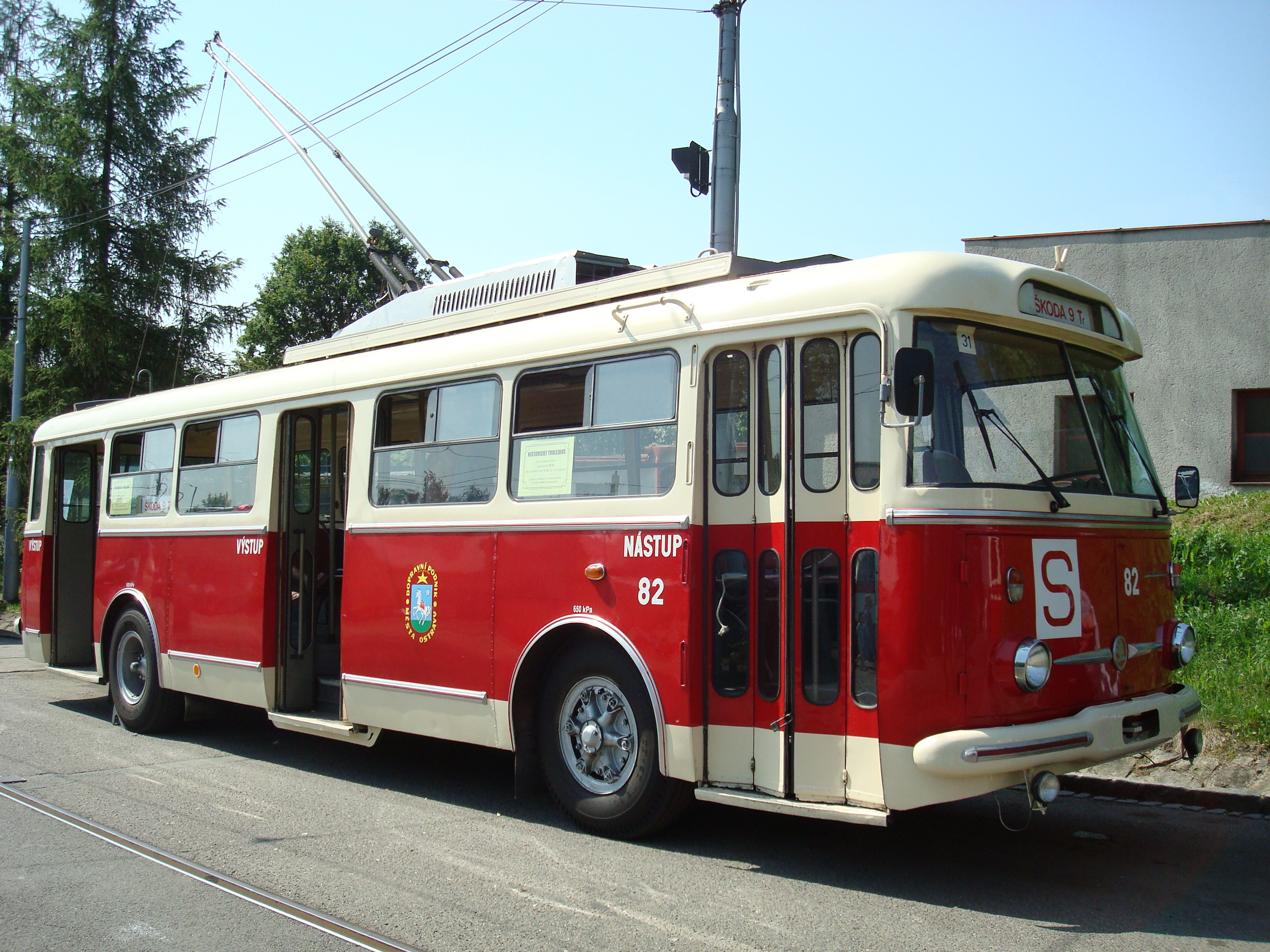 Ostrava